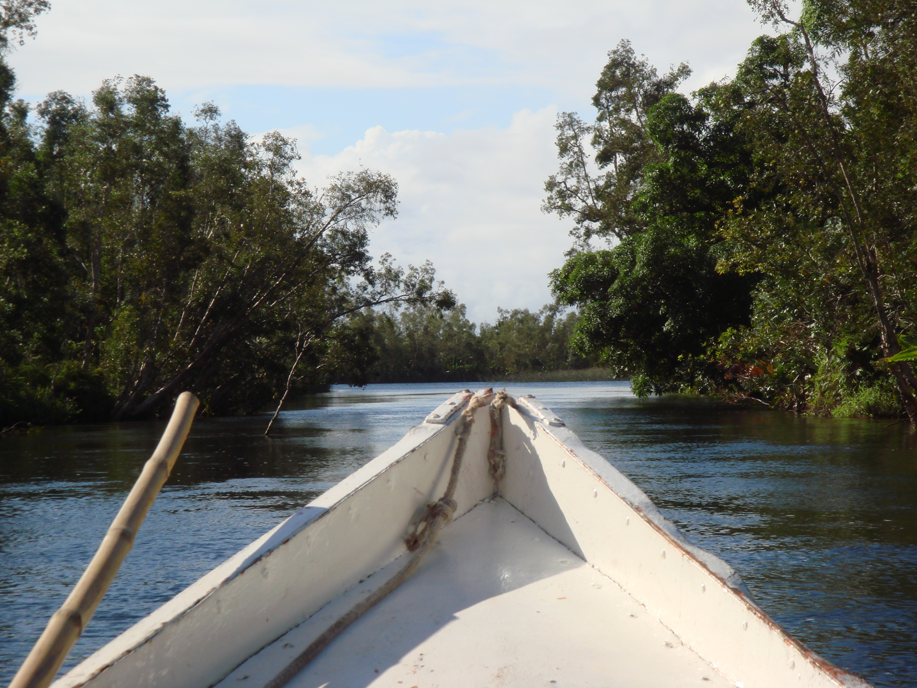 Canal des Pangalanes